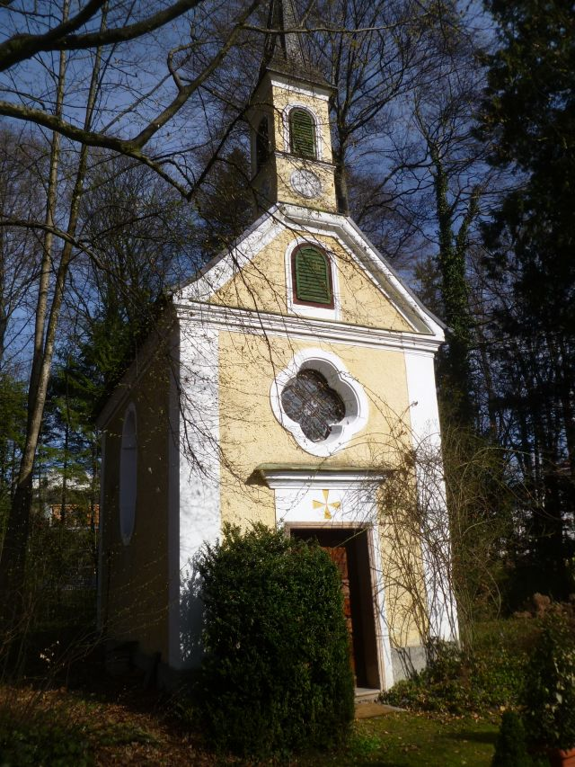 Nonntaler_Hauptstraße_51-53-Kapelle